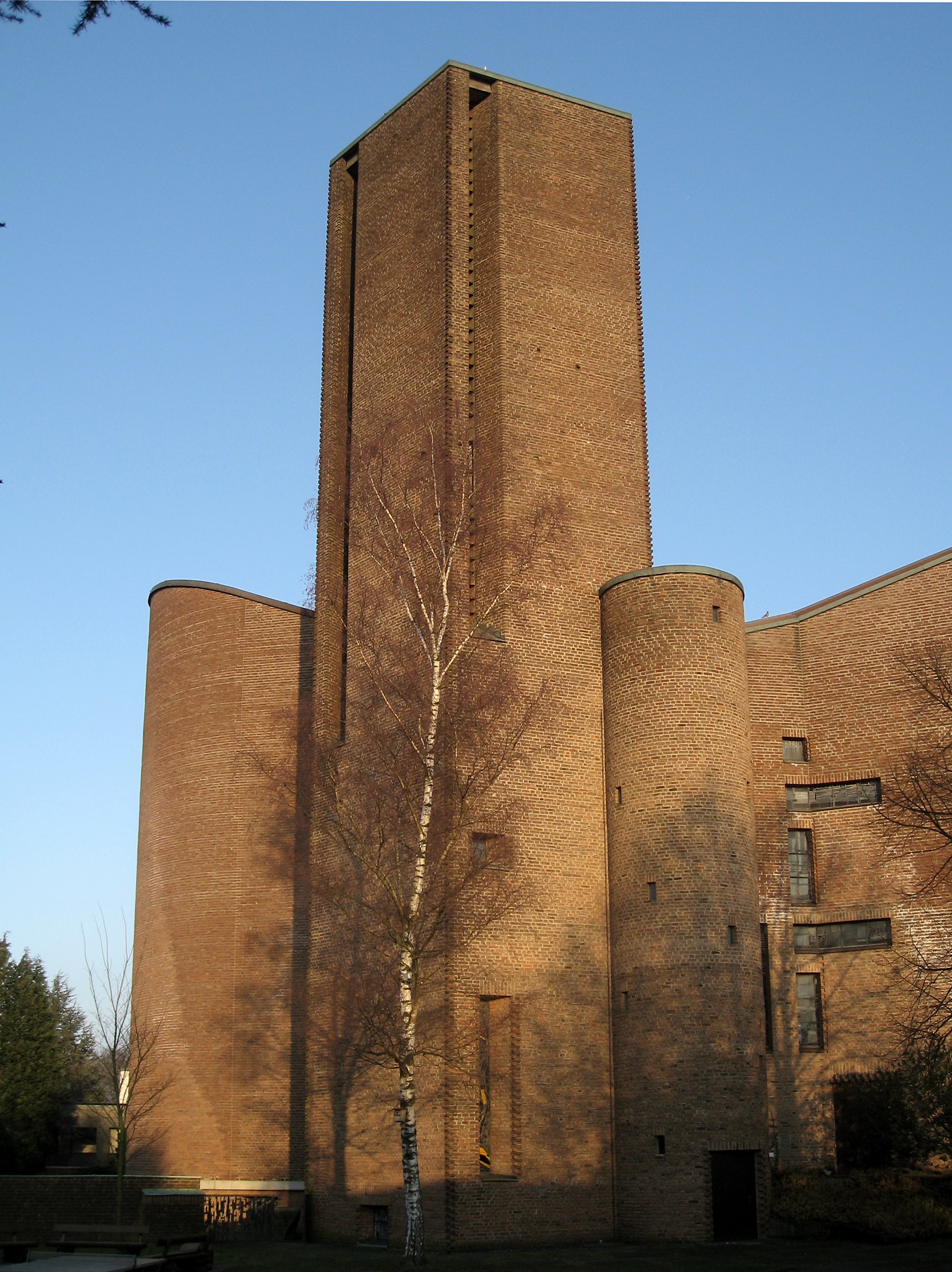 Meschede, Abtei Königsmünster